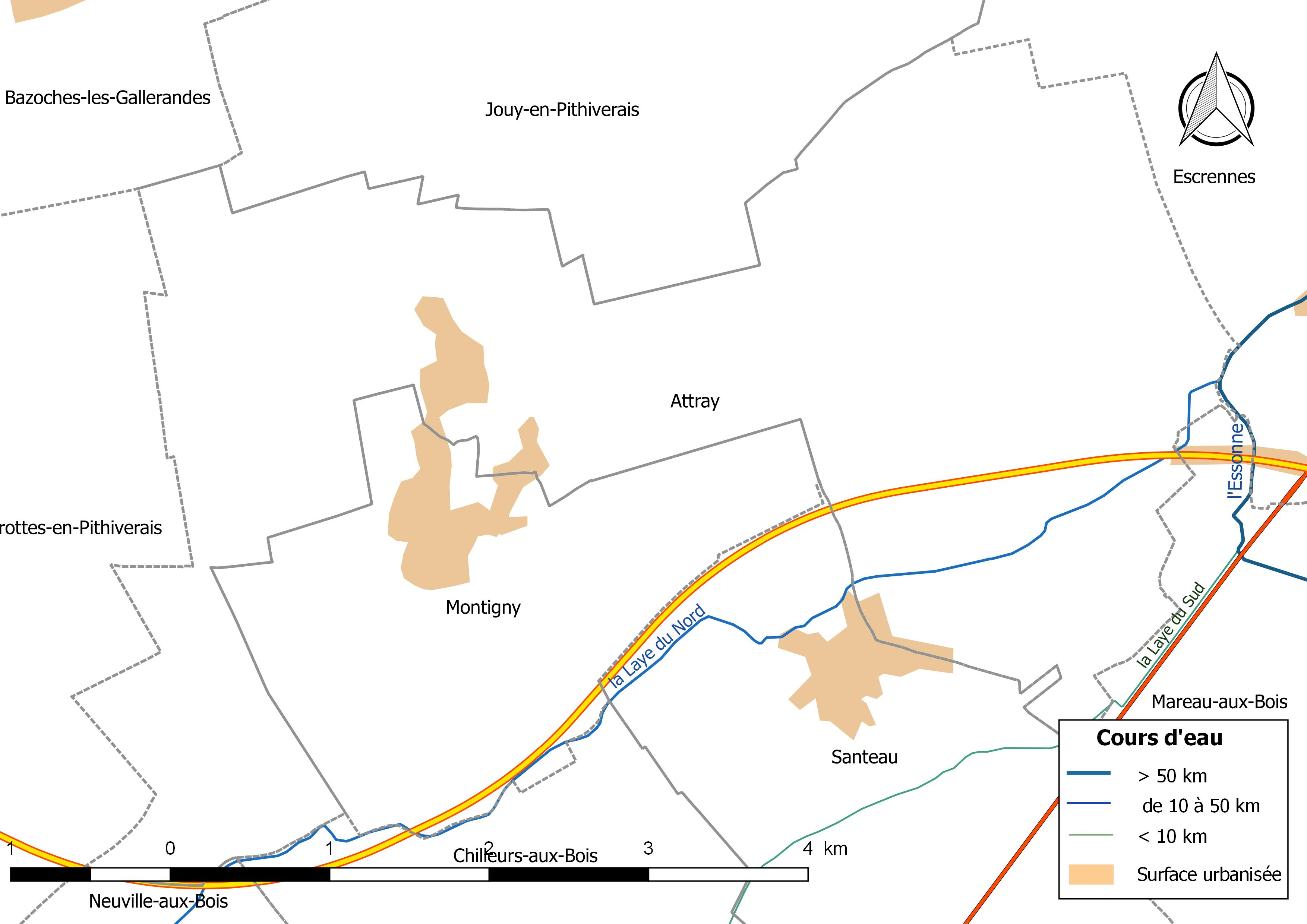 Carte du réseau hydrographique de la commune de Attray (France).